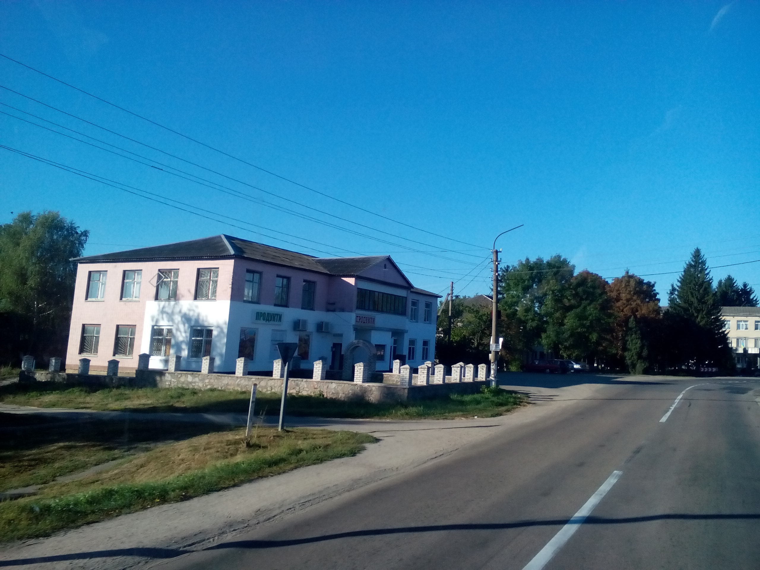 Село Маслівка Миронівського району Київської області